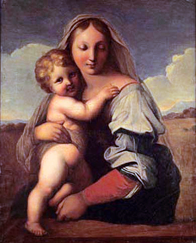 Copie de la Madone Mackintosh de Raphaël conservée à la National Gallery de Londres